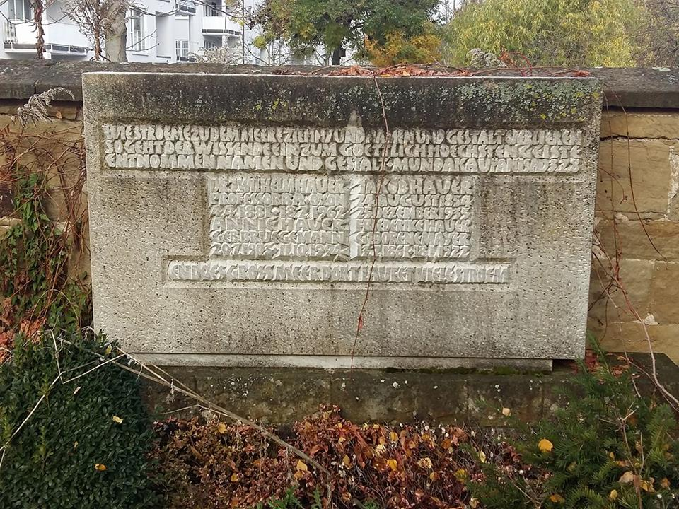 Grabmals Jakob Wilhelm Hauers auf dem Friedhof in Ditzingen